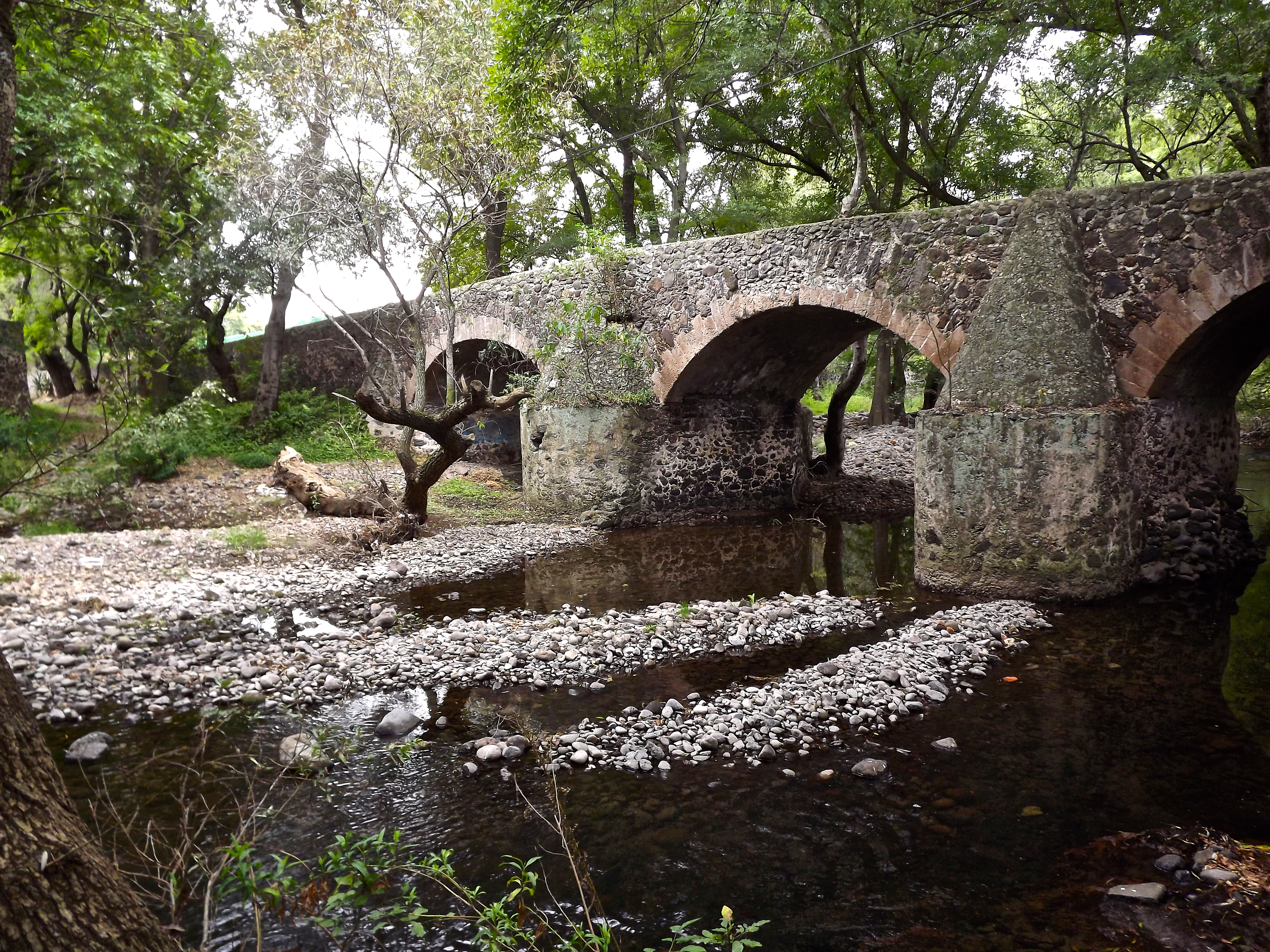 Puente de Tlautla también denominado Puente las Animas, localizado en Santiago Tlautla, municipio de Tepeji del Río de Ocampo, Hidalgo; este puente forma parte del “Tramo del Camino Real entre el puente de La Colmena y la antigua Hacienda de La Cañada” uno de los sesenta sitios declarados Patrimonio de la Humanidad bajo la denominación de el Camino Real de Tierra Adentro.